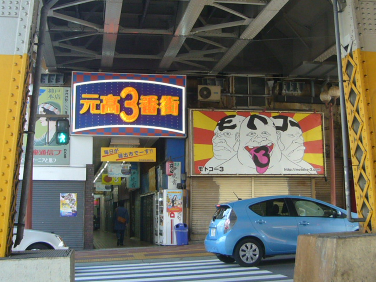 2017年4月撮影。モトコー3番街の入り口写真です。 Panasonic Lumix DMC-FX01